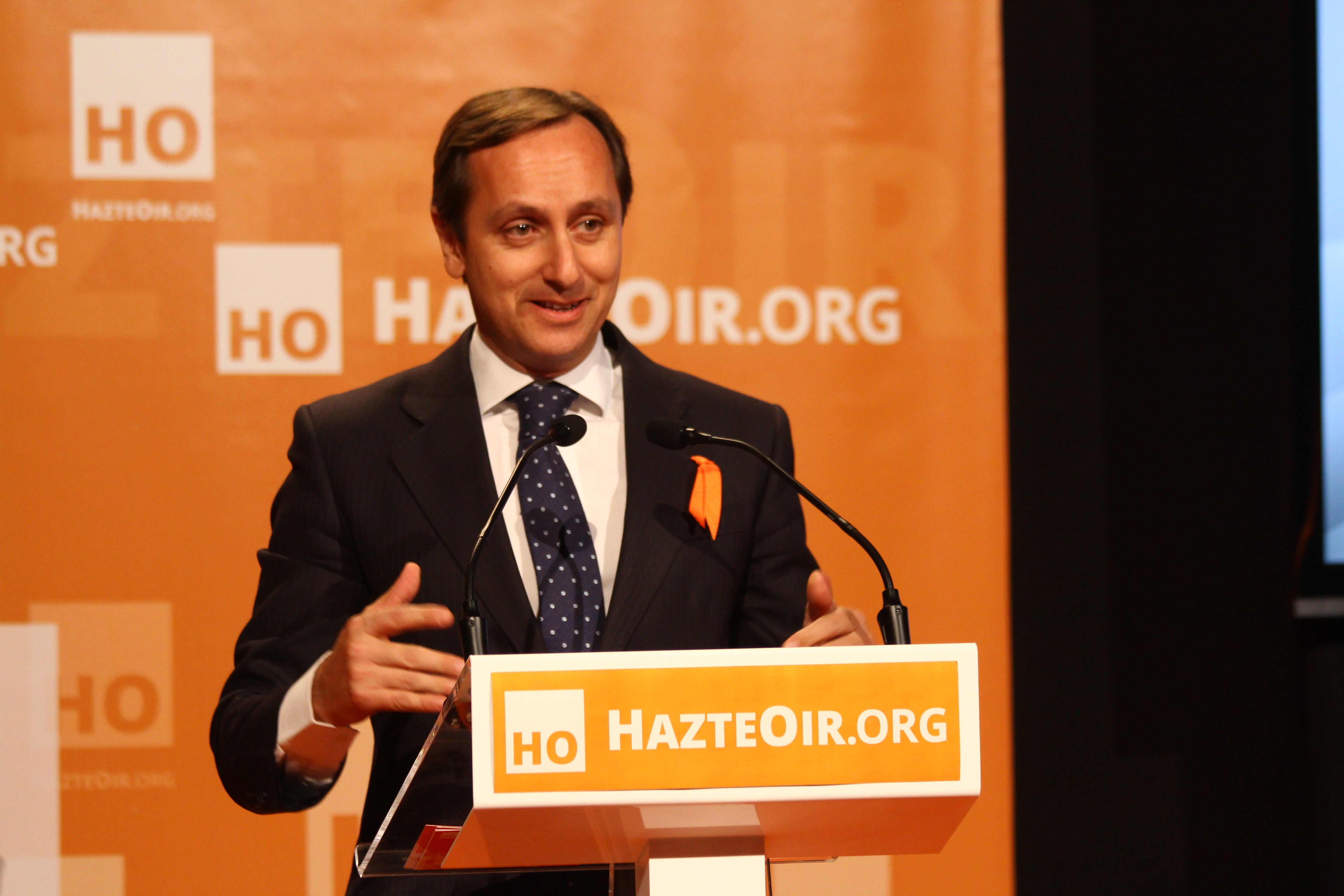 Carlos Cuesta, agradece este reconocimiento por parte de